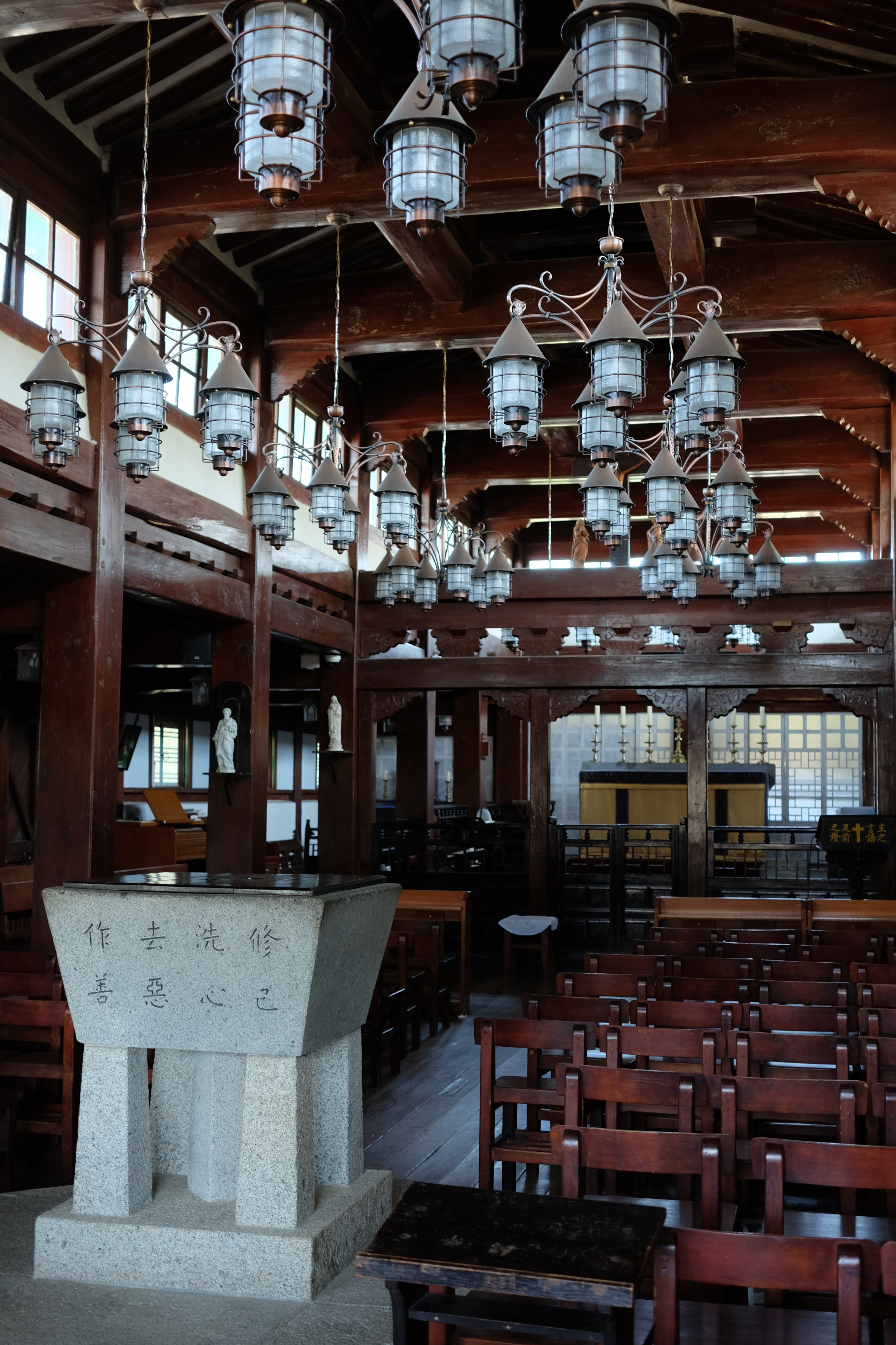 대한성공회 강화성당